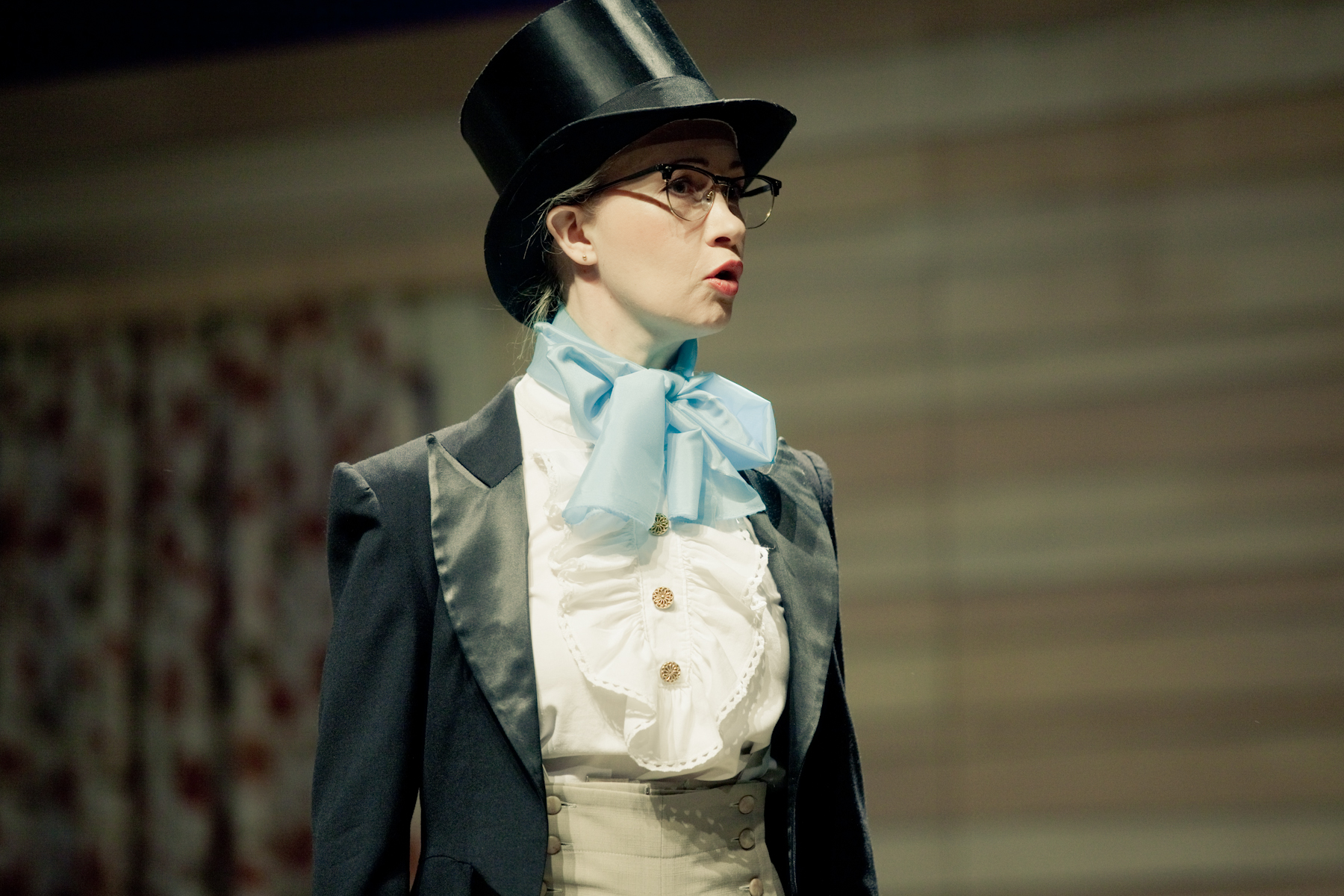 Marika Barabanštšikova lavastuses 'Kalendritüdrukud'. Fotograaf Gabriela Liivamägi.